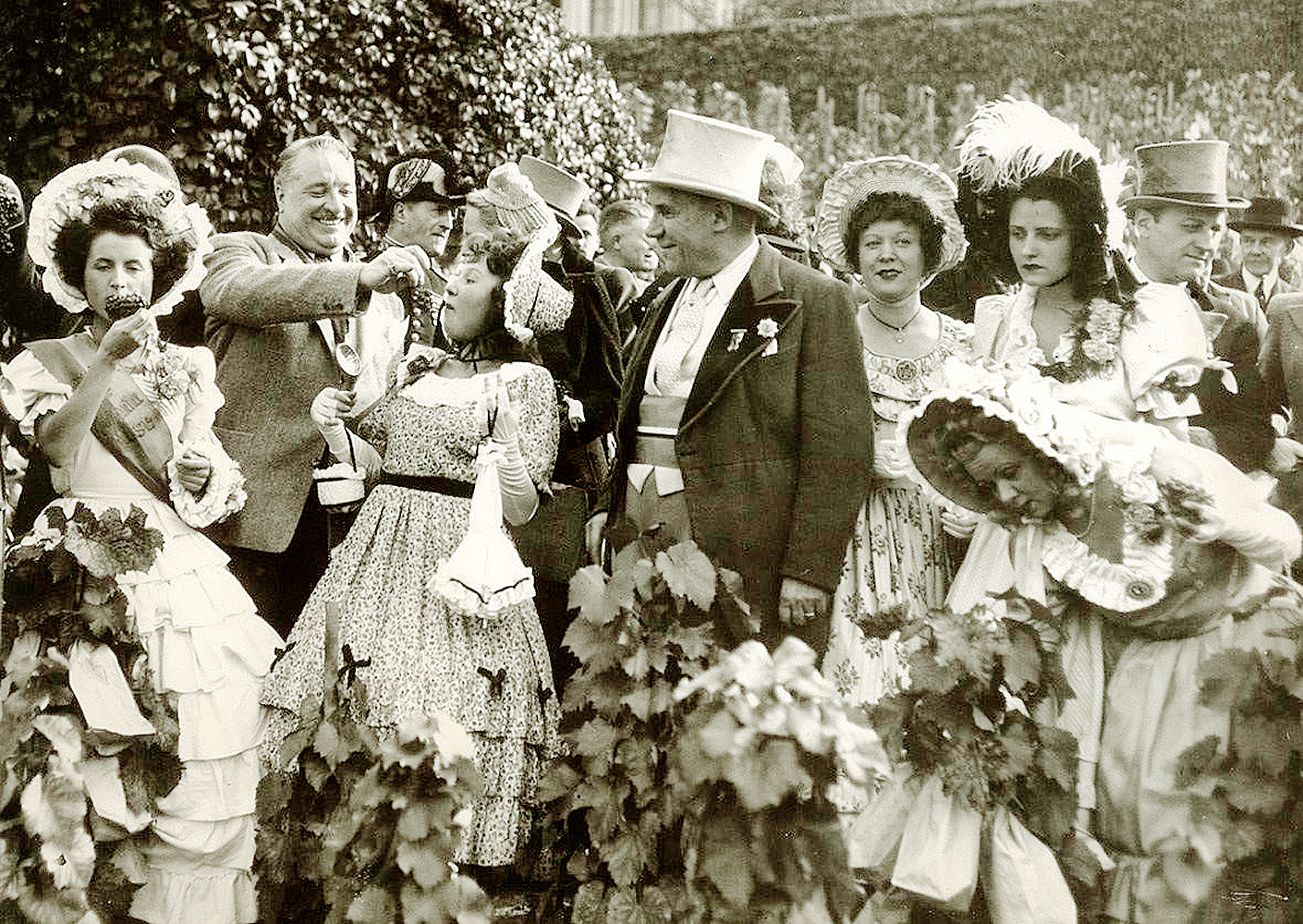 Fête des vendanges à Monmartre en 1939